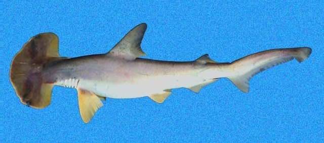 Sphyrna corona, Panama